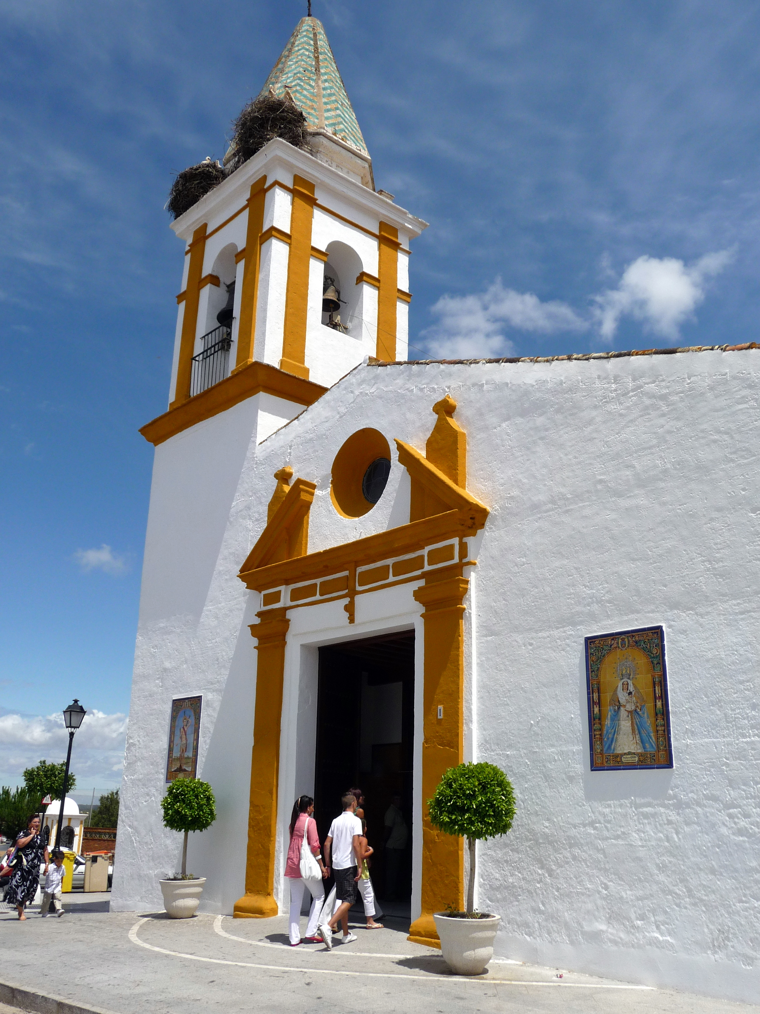 Parroquia de Nuestra Señora de Los Remedios. Aljaraque. Provincia de Huelva